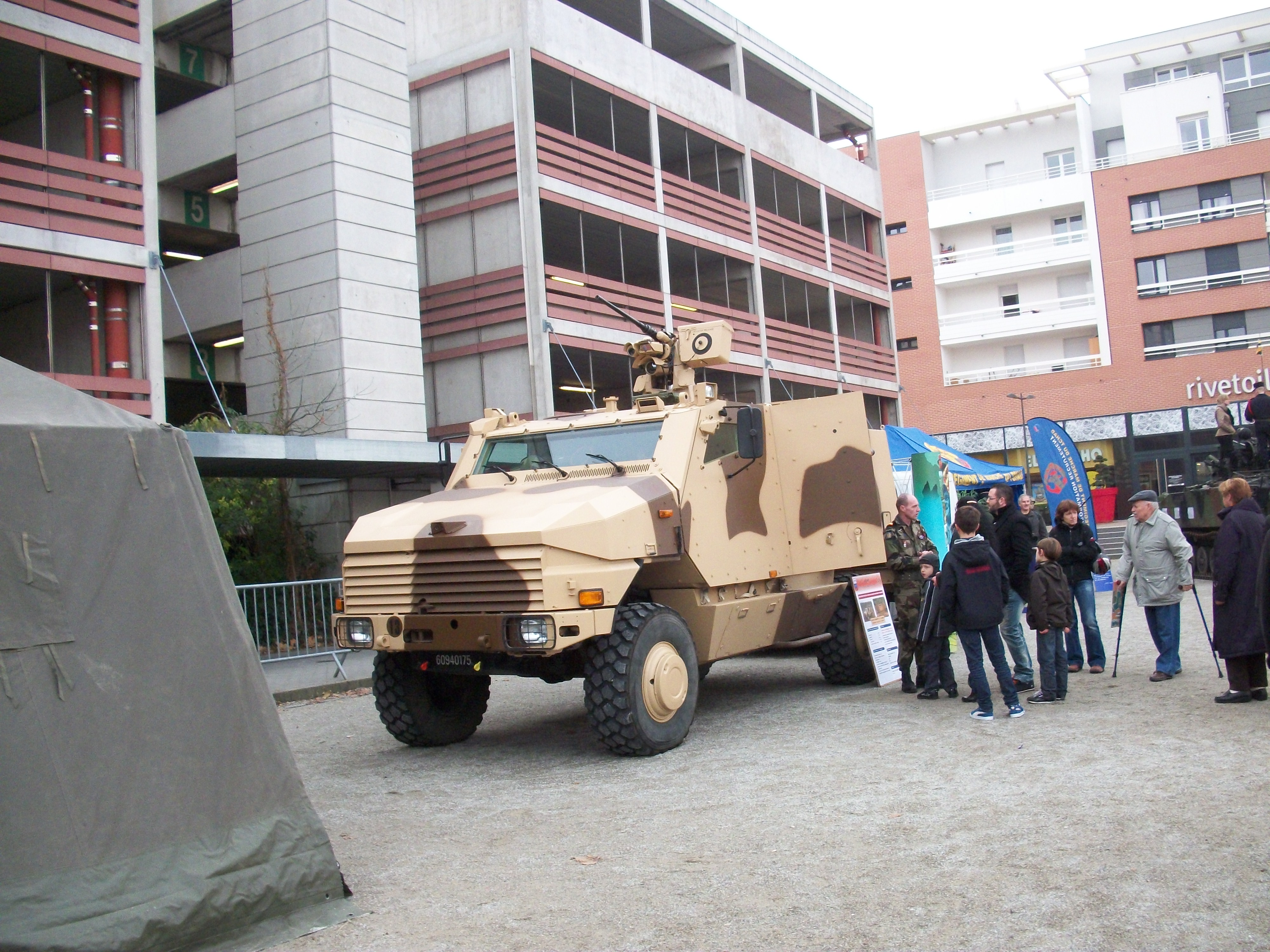 Présentation de véhicules de l'armée française devant Rivétoile, Strasbourg